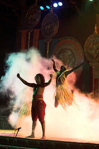 Kangeelu Kunita is a popular folk dance from Karnataka.Kangeelu Kunitha